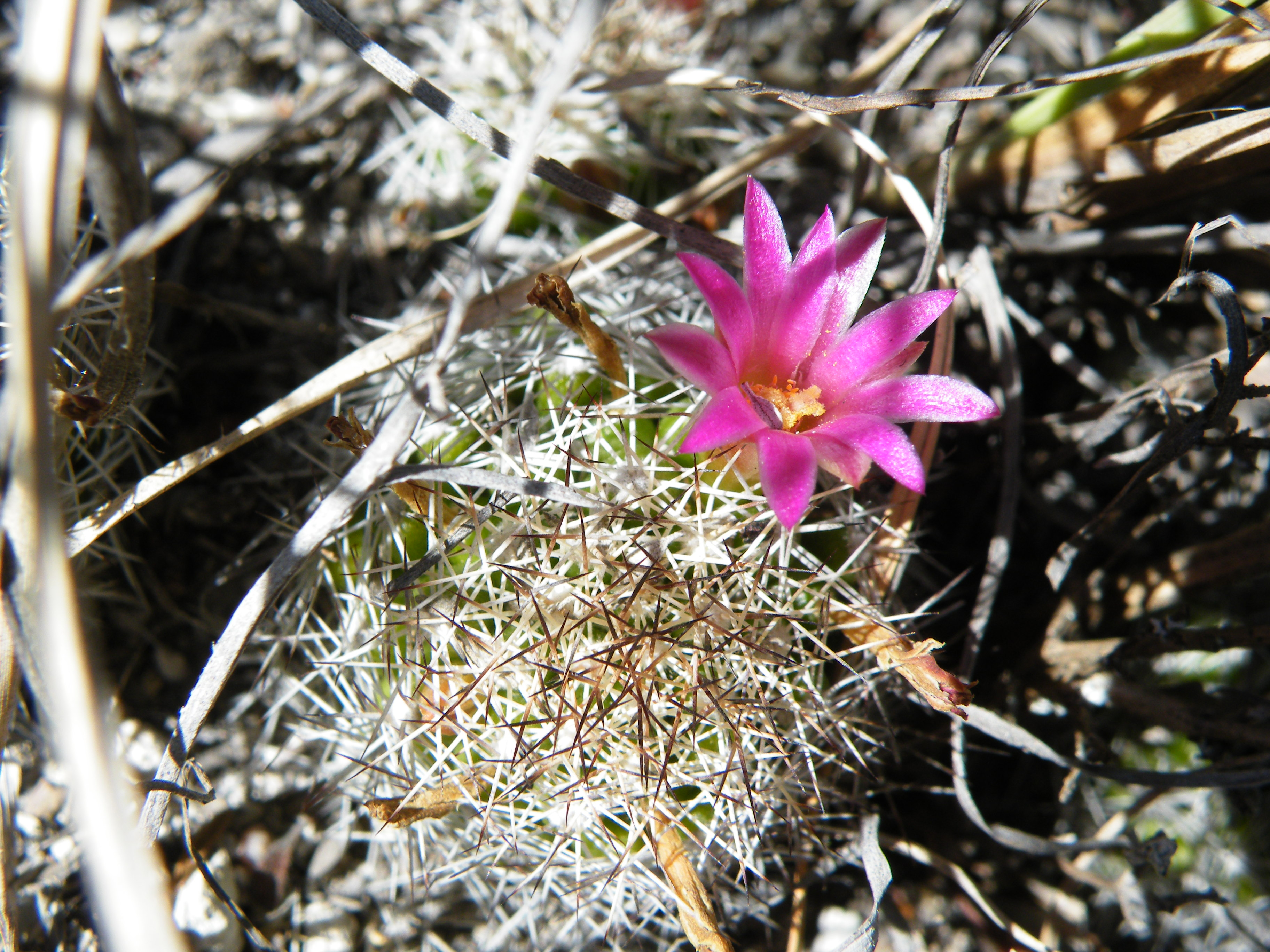 Near Canada Morelos, Puebla